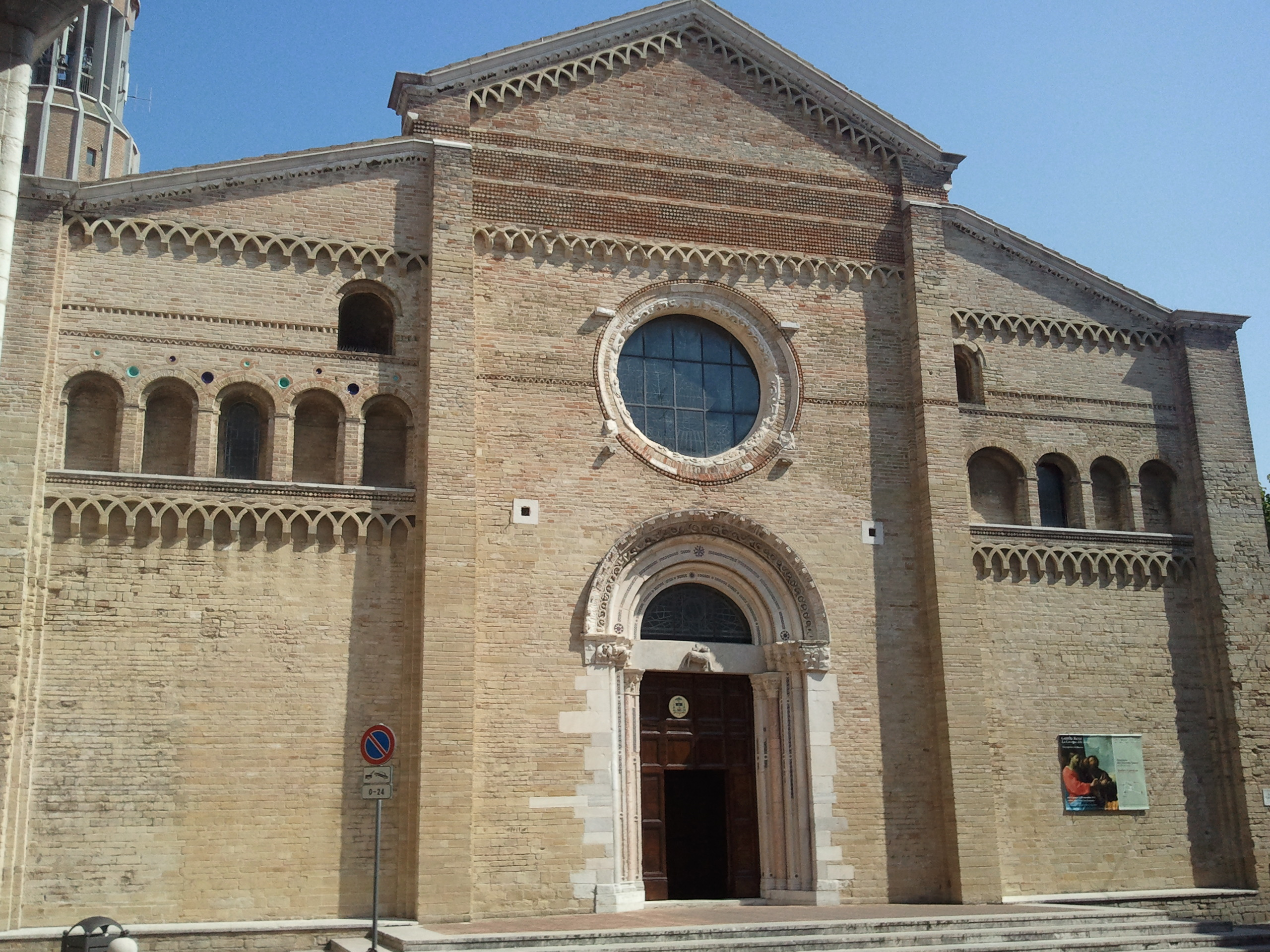 Duomo di Fano, facciata del XII secolo